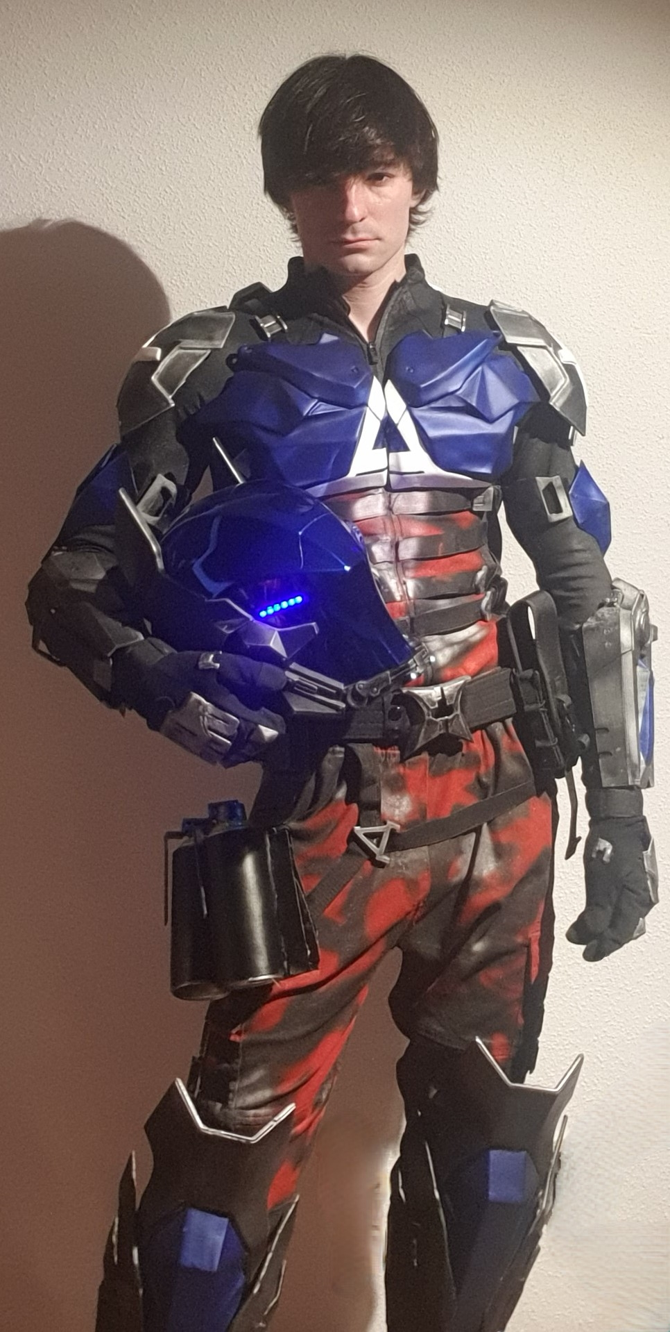 Cosplayer (IG: Cosp_Life) como el Caballero de Arkham